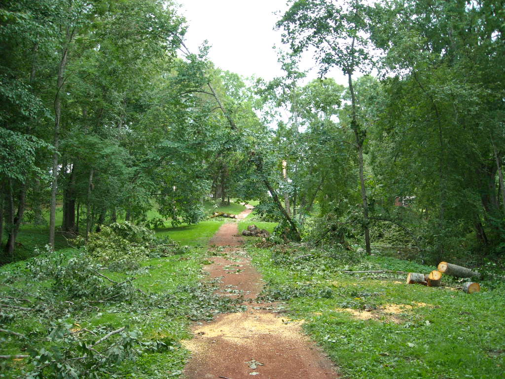 Albu mõisa park